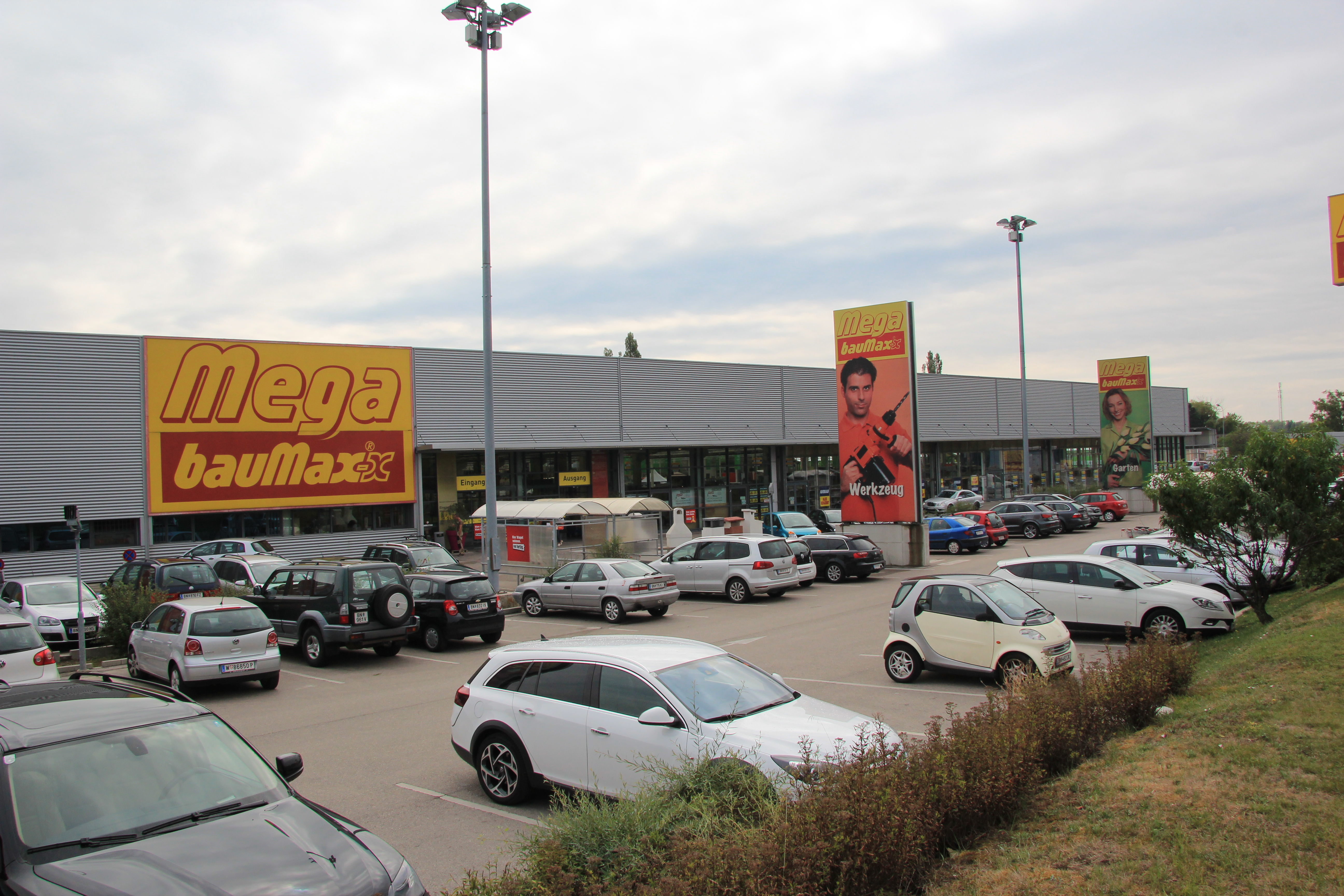 Ehemalige Baumarktfiliale der Firma Baumax in Baden